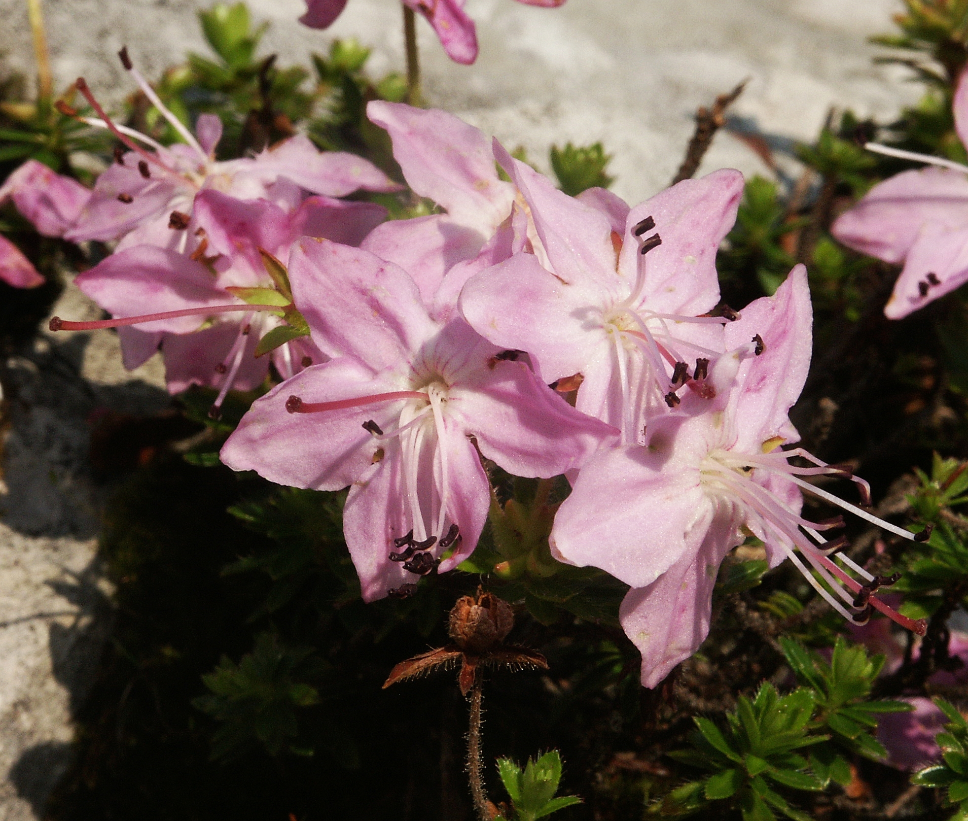 Rhodothamnus chamaecistus, Berchtesgadener Alpen, Germany